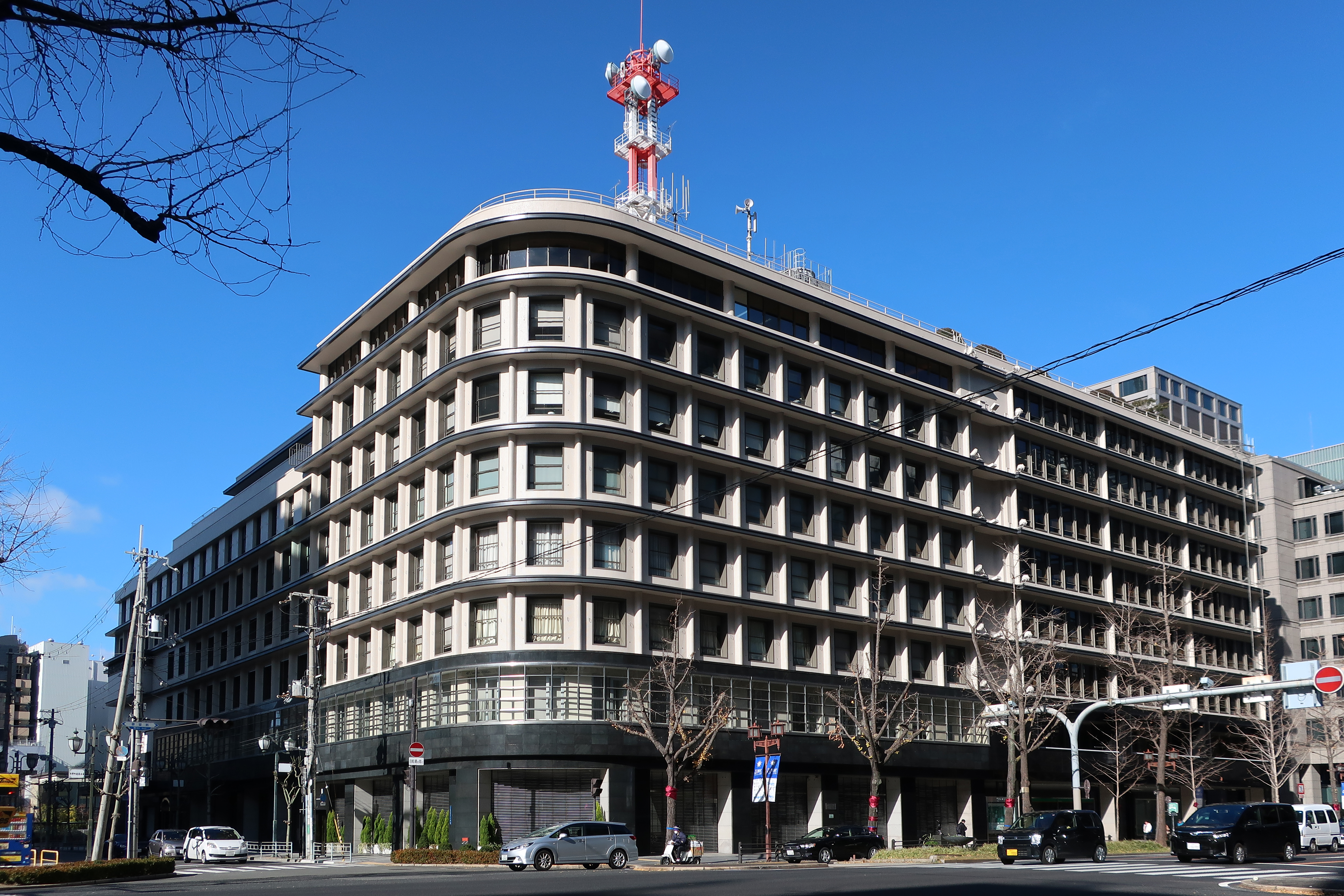 Osaka Gas Building (大阪瓦斯ビルヂング), Osaka, Osaka prefecture, Japan. Canon PowerShot G9 X Mark II